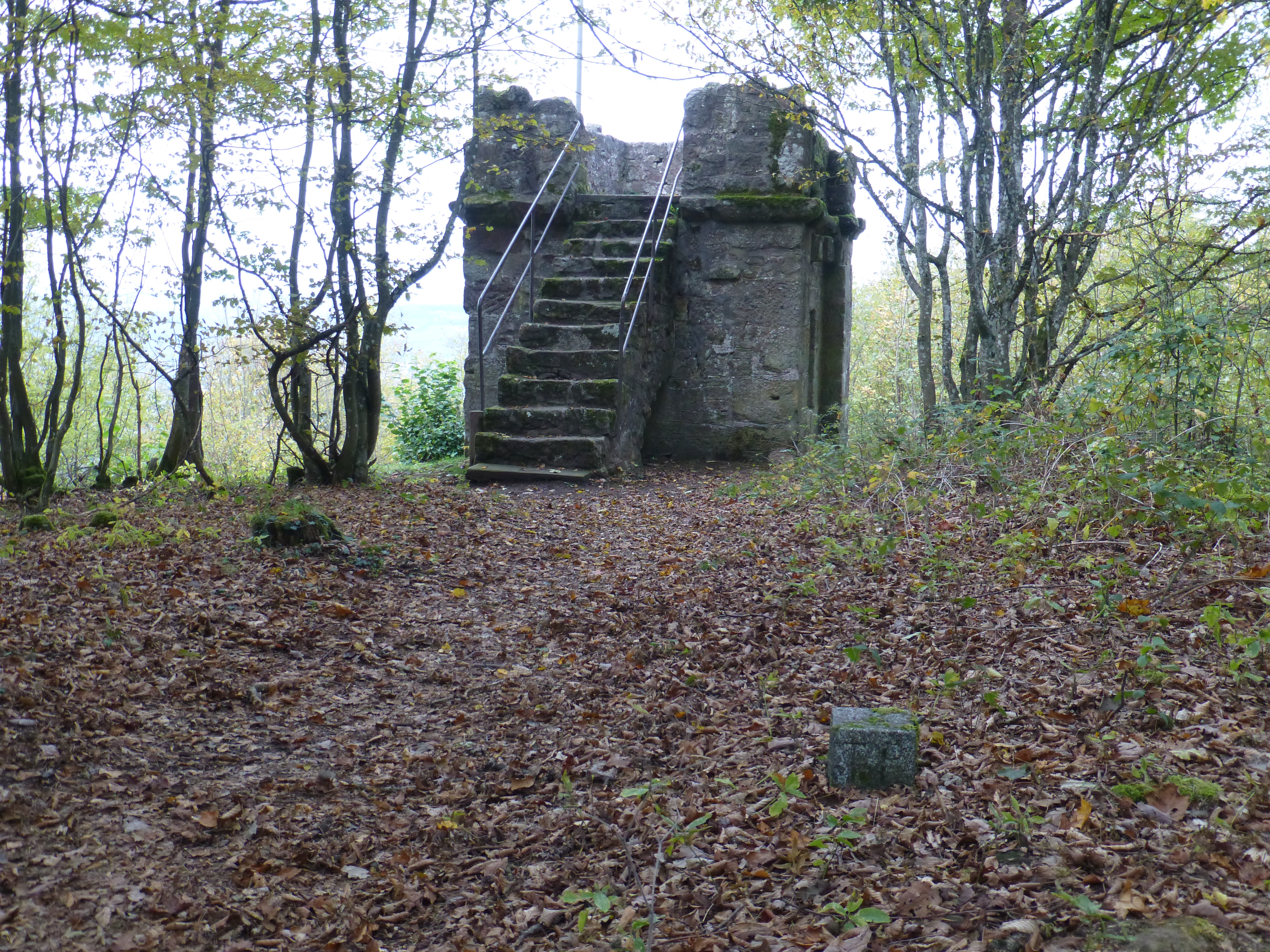 Die Heidenburgwarte auf dem Kreimberg